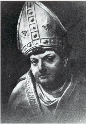 Erzbischof Uriel von Gemmingen, Mainz, Zeichnung um 1514